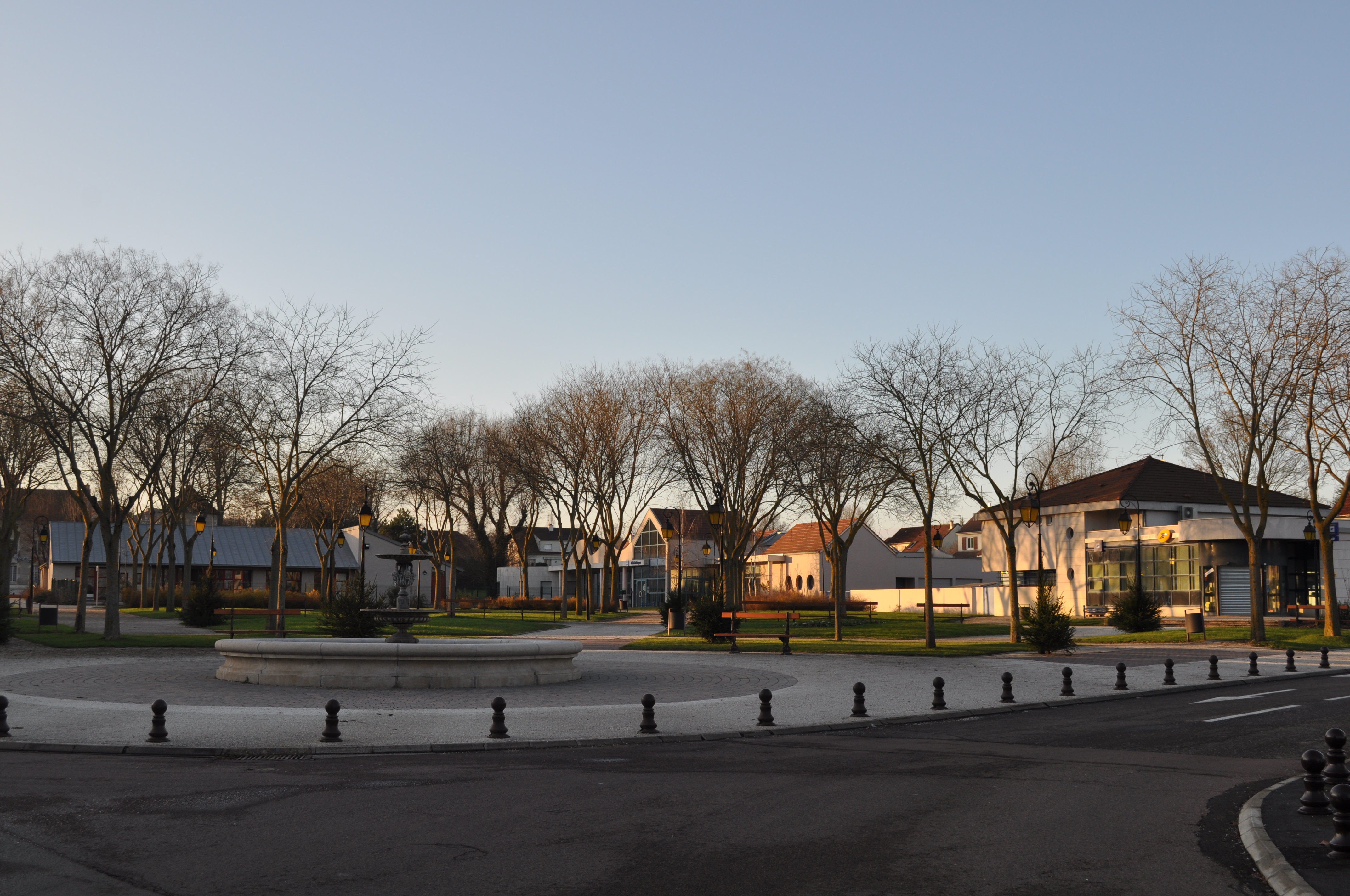 Place centrale de Saint-Apollinaire, Côte-d'Or